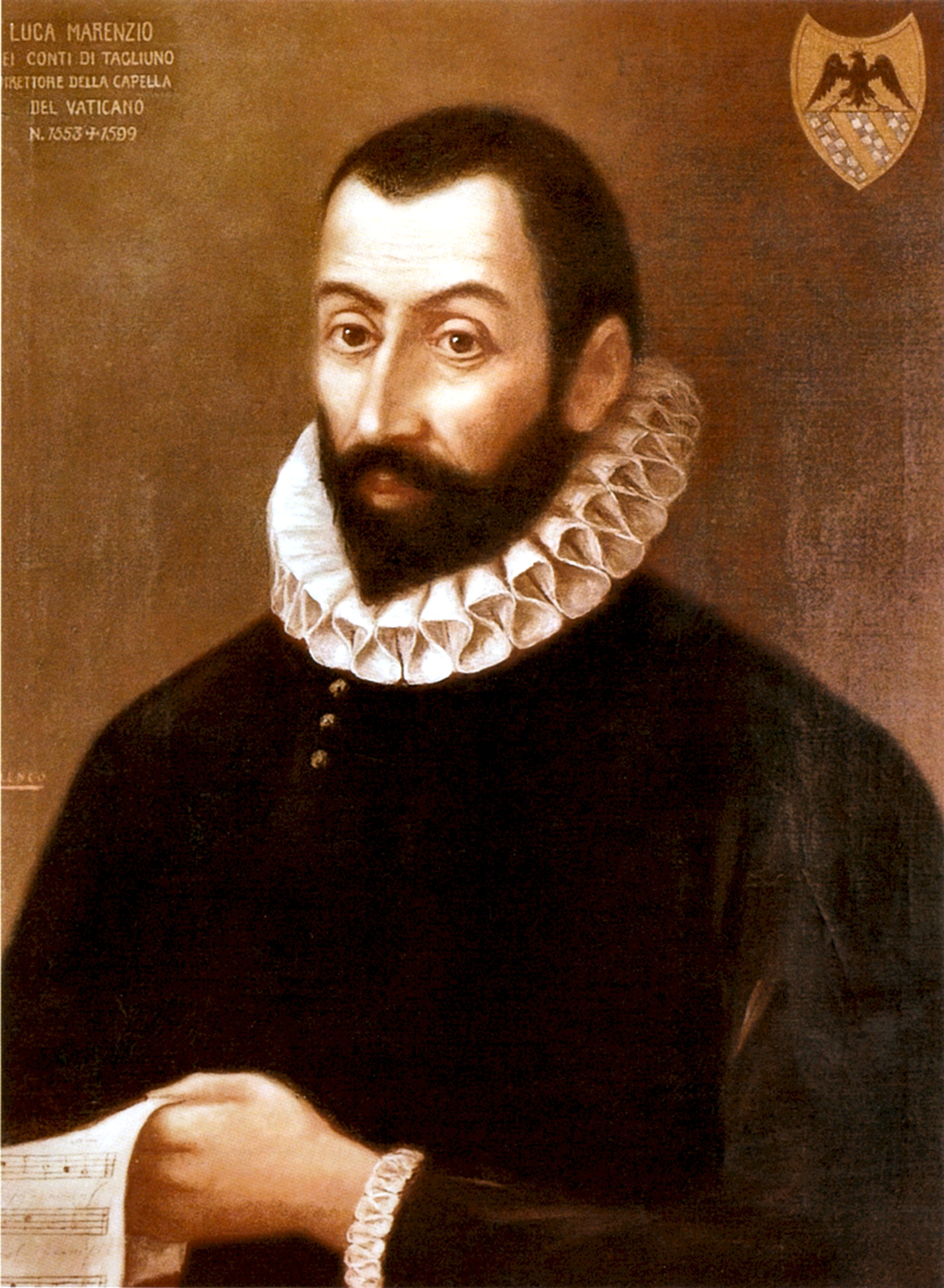 Luca Marenzio conte di Tagliuno e Talgate, Komponist des 16. Jahrhunderts